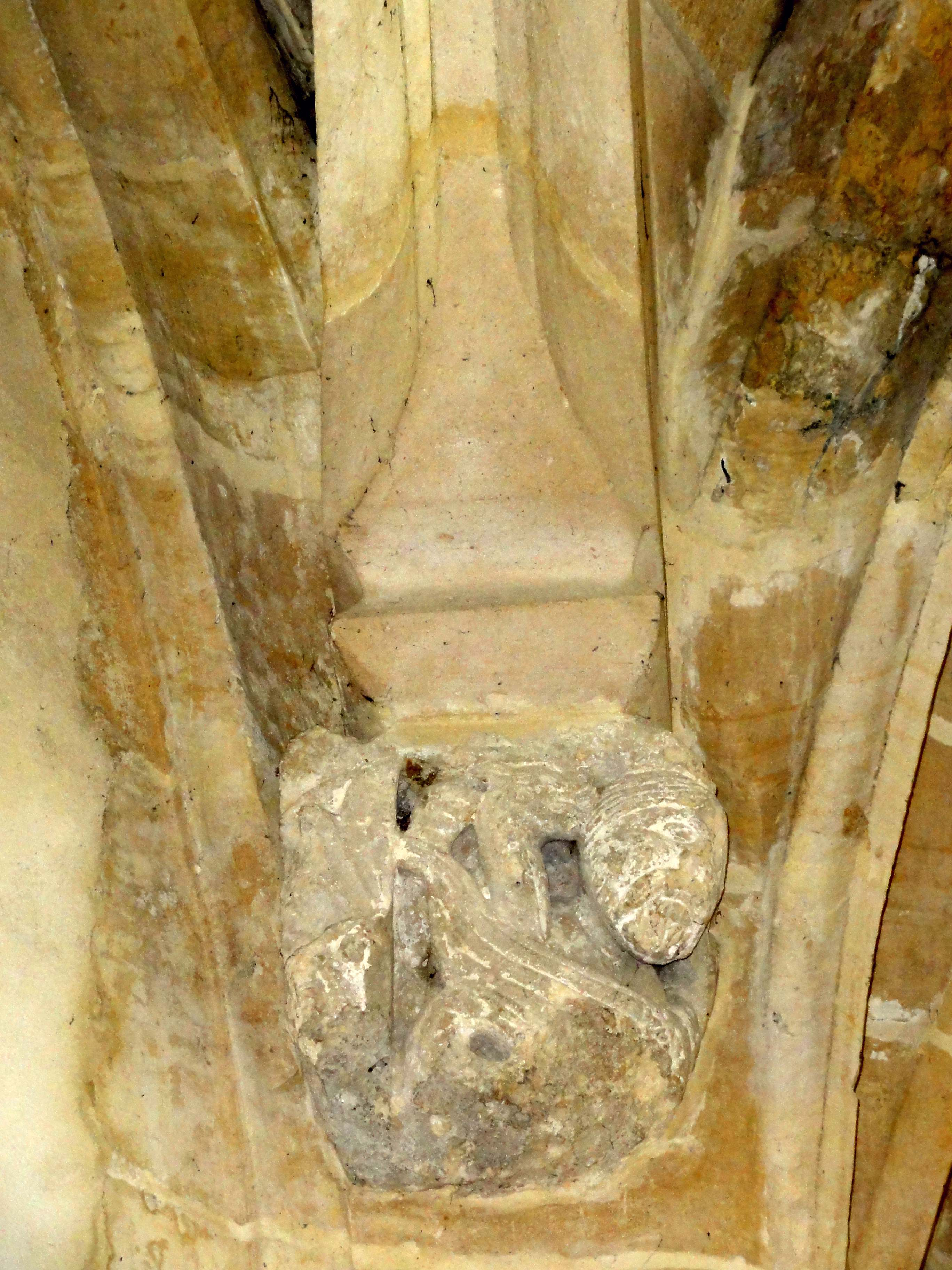 Bas-côté sud, 2e travée, cul-de-lampe dans l'angle sud-ouest.